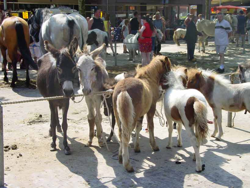 eigen werk, vrijgegeven voor openbaar gebruik gefotografeerd in Bemmel in 2004